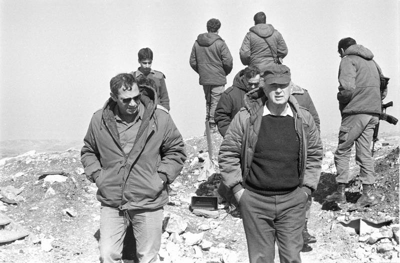 שר הביטחון רא"ל יצחק רבין, לצדו מפקד יחידת הקישור ללבנון (יק"ל) תא"ל דני רוטשילד